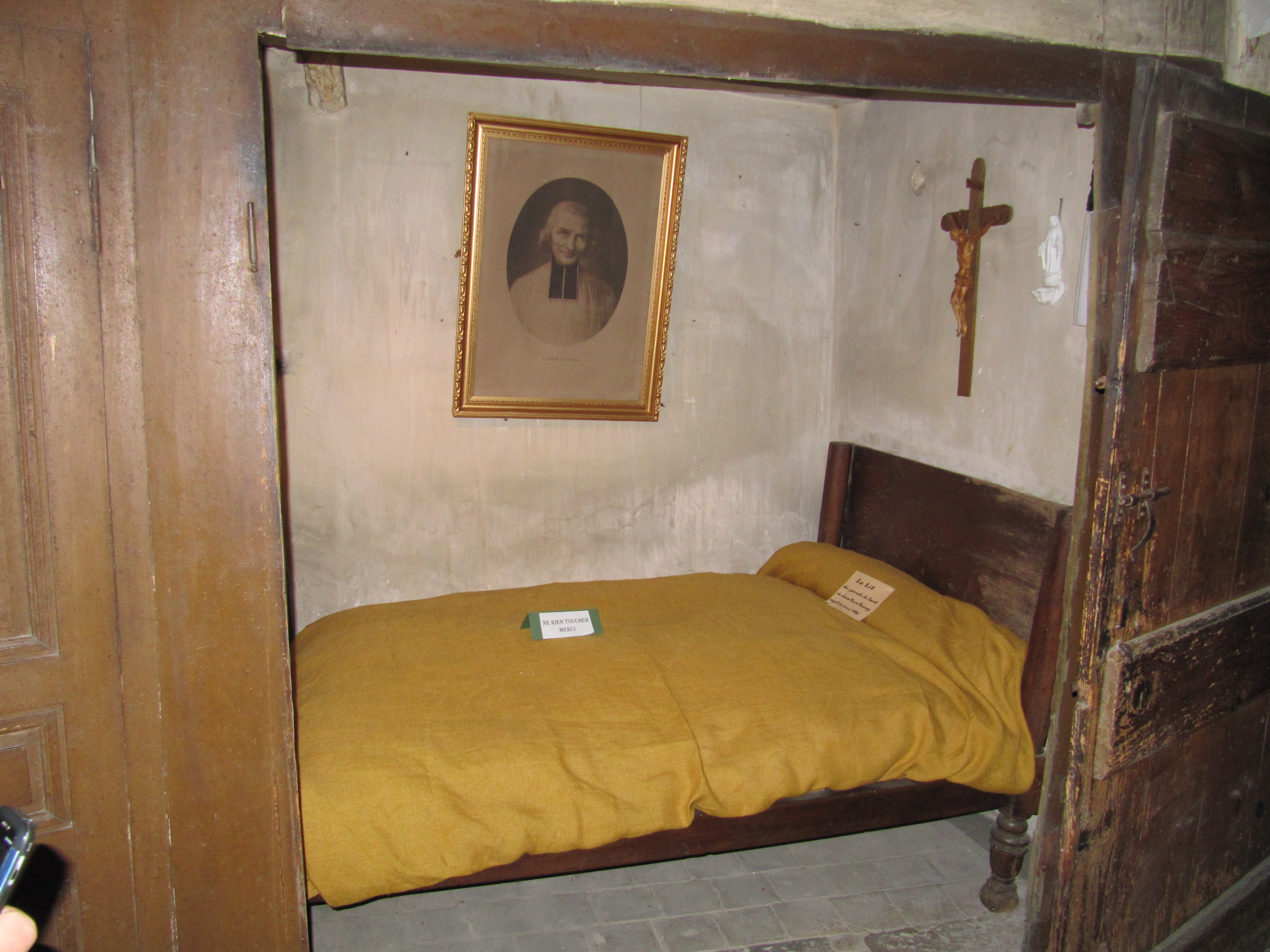 La Maison natale du Curé d'Ars